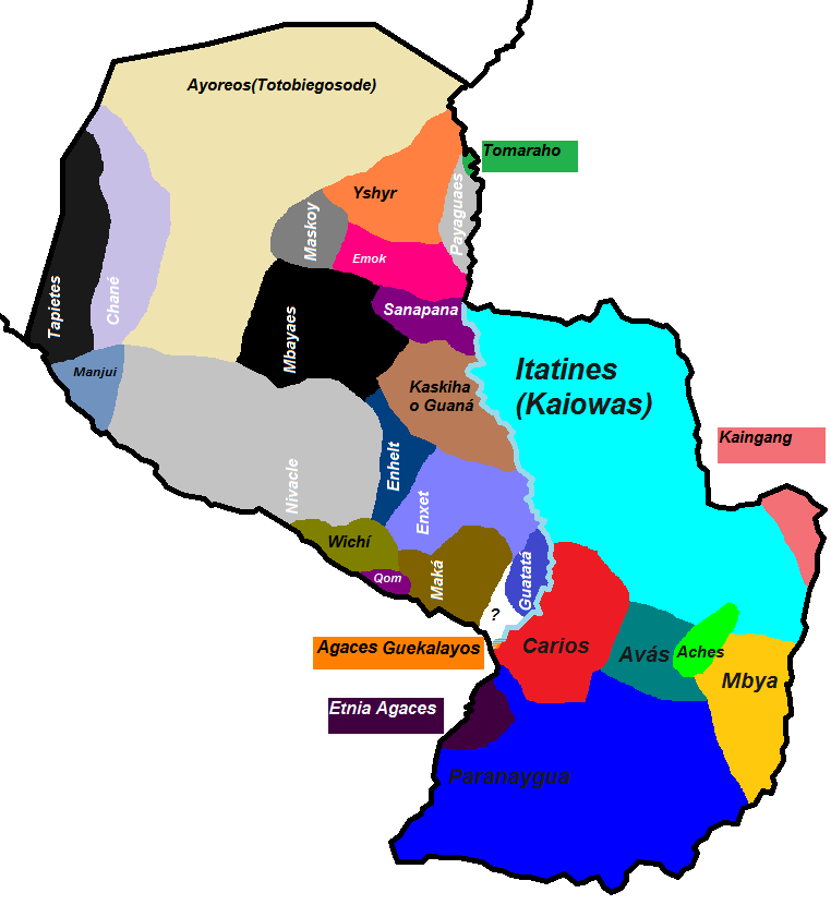 Mapa de los Indigenas del Paraguay